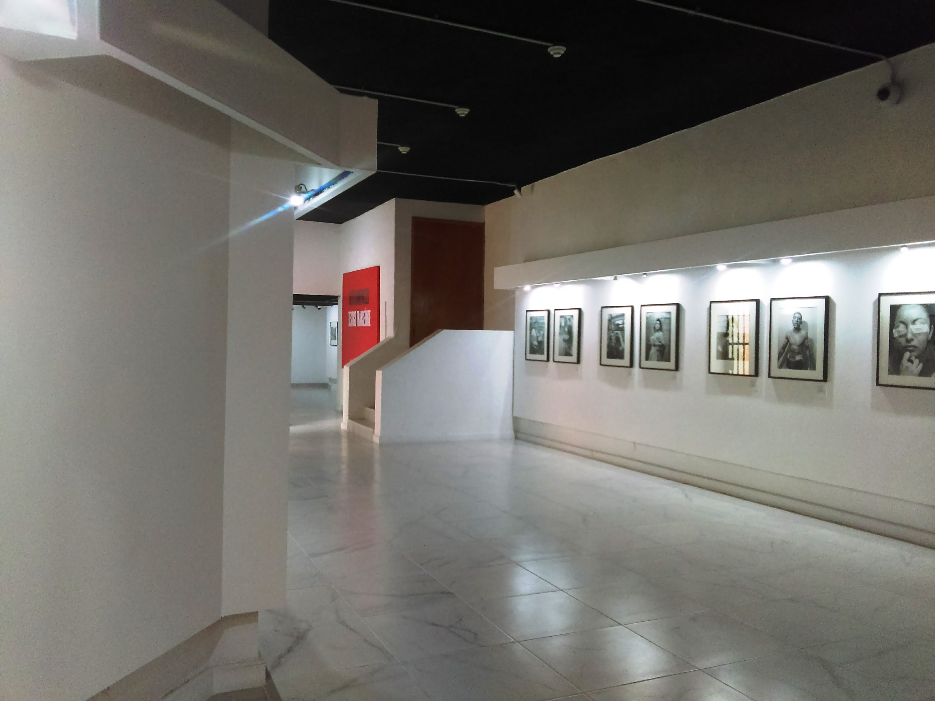 Sala Nacho López